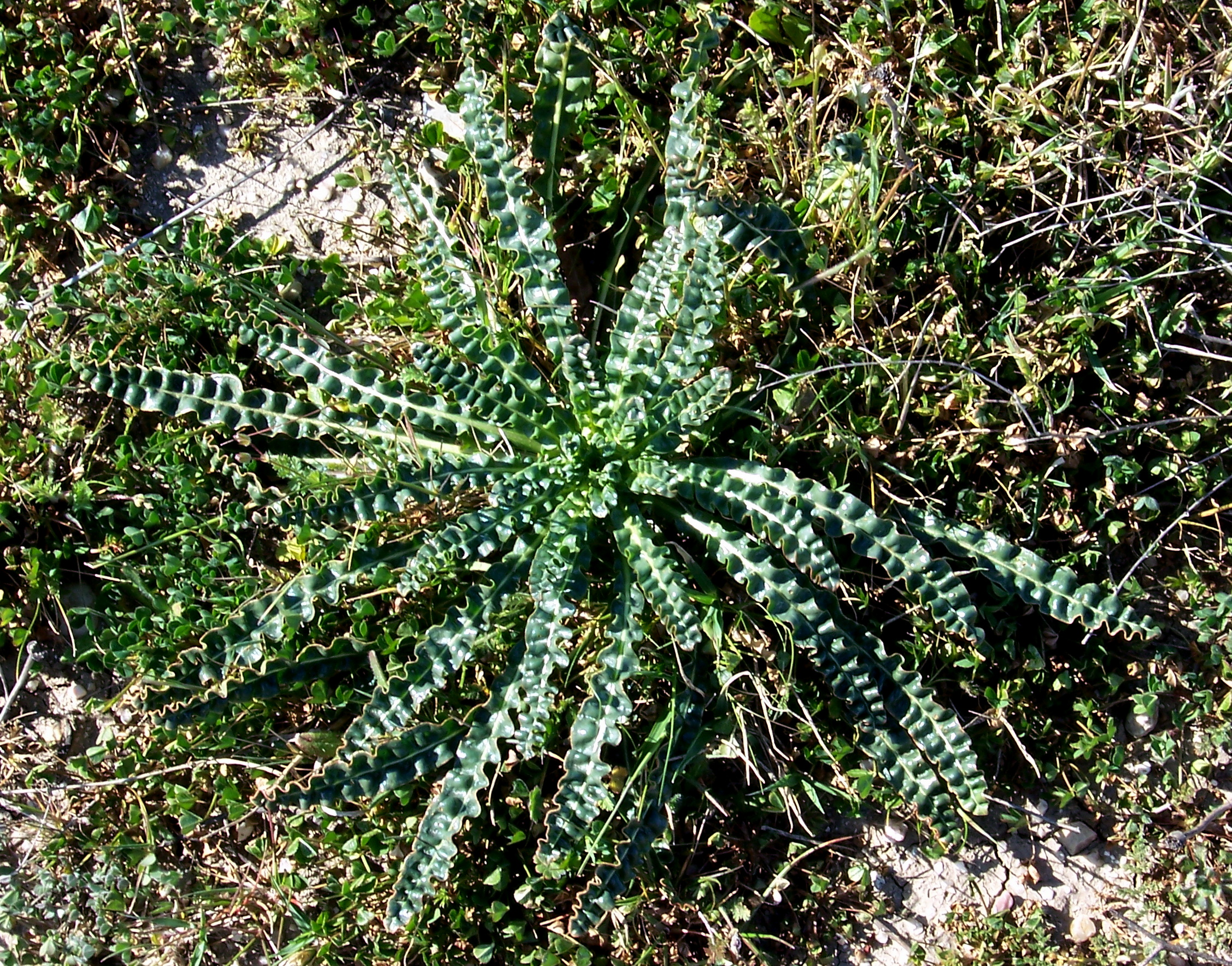 Reseda luteola (gualda) - Roseta basal de hojas con márgenes ondulados. Prado de Rejas, circa antiguo IES García Morato, Camino Viejo de Alcalá (Provincia de Madrid, España).